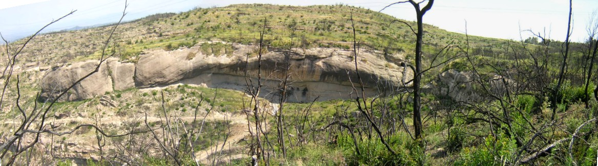 La Roca Giberta